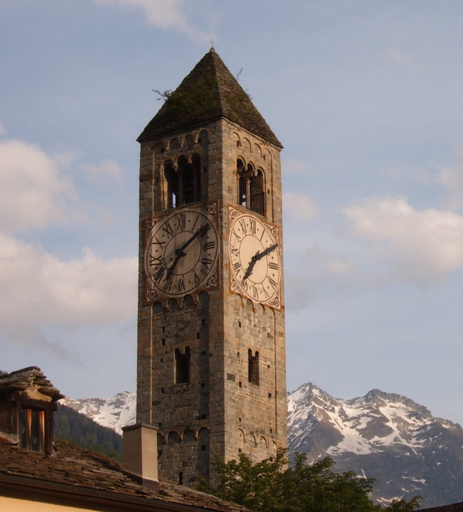 Chiesa di San Martino, Olivone, Valle di Blenio, Ticino (Switzerland)